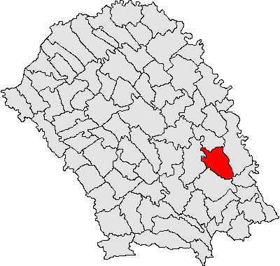 Categorie:Hărţi ale judeţului Botoşani